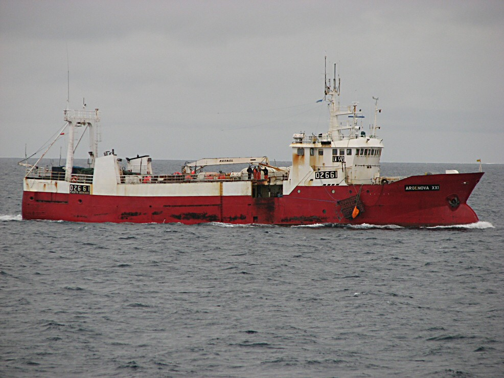 Longliner 'Argenova-XXI' (flag Argentina), 19 January 2010, Ross Sea, Antarctica